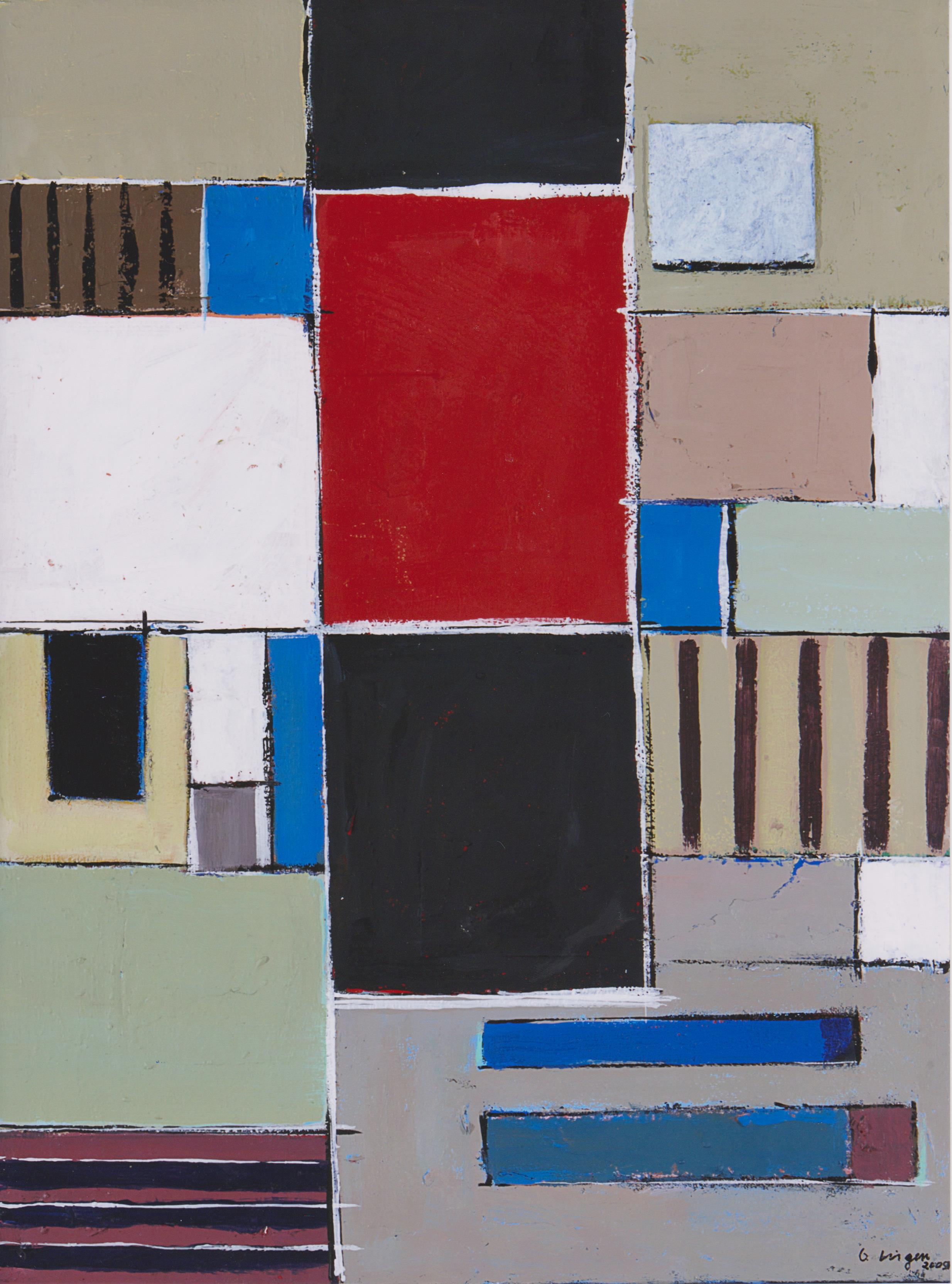 Dieter Sieger, Untitled, 2009